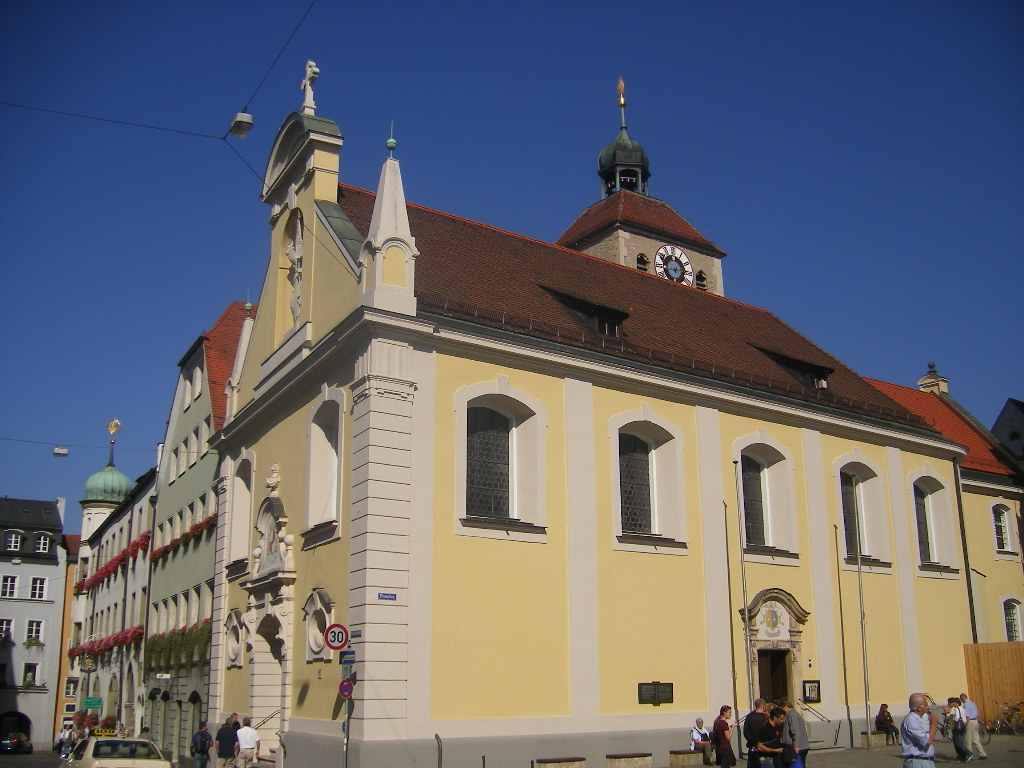 Regensburg, Stiftskirche St. Johann, früher Taufkirche des Domes.